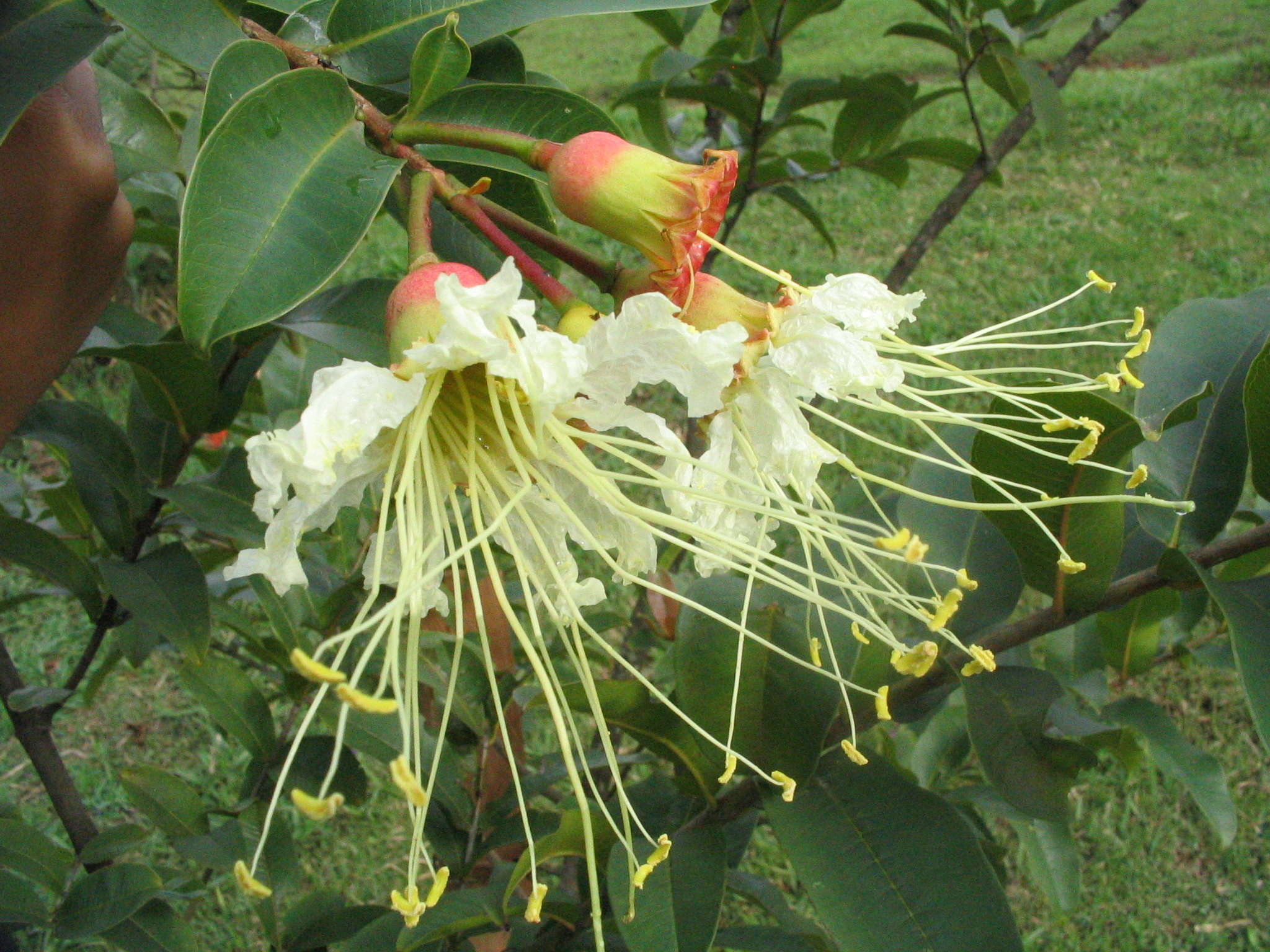 Fotos das flores de Lafoensia pacari, árvore nativa do Brasil, conhecida popularmente como dedaleira.